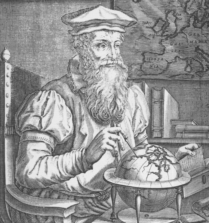 Gerardus Mercator